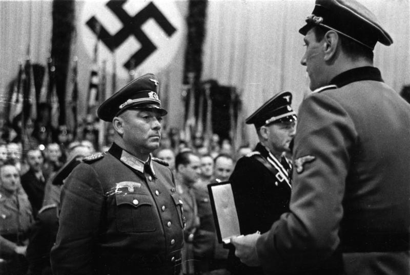 Helmut Körner und Otto Skorzeny Grosskundgebung im Berliner Sportpalast anlässlich des Erntedanktages 1943 UBz. SS-Sturmbannführer [Otto] Skorzeny überreicht Militärverwaltungsvizechef [Helmut] Körner das Ritterkreuz des Kriegsverdienstkreuzes. Scherl Bilderdienst, Schwahn, 3.10.43 Abgebildete Personen: Körner, Helmut: General, Militärverwaltungs-Vizechef, Ritterkreuz (RK) zum Kriegsverdienstkreuz (KVK), Deutschland Skorzeny, Otto: SS-Hauptsturmführer, Ritterkreuz (RK), Waffen-SS, Deutschland (GND 118614886)